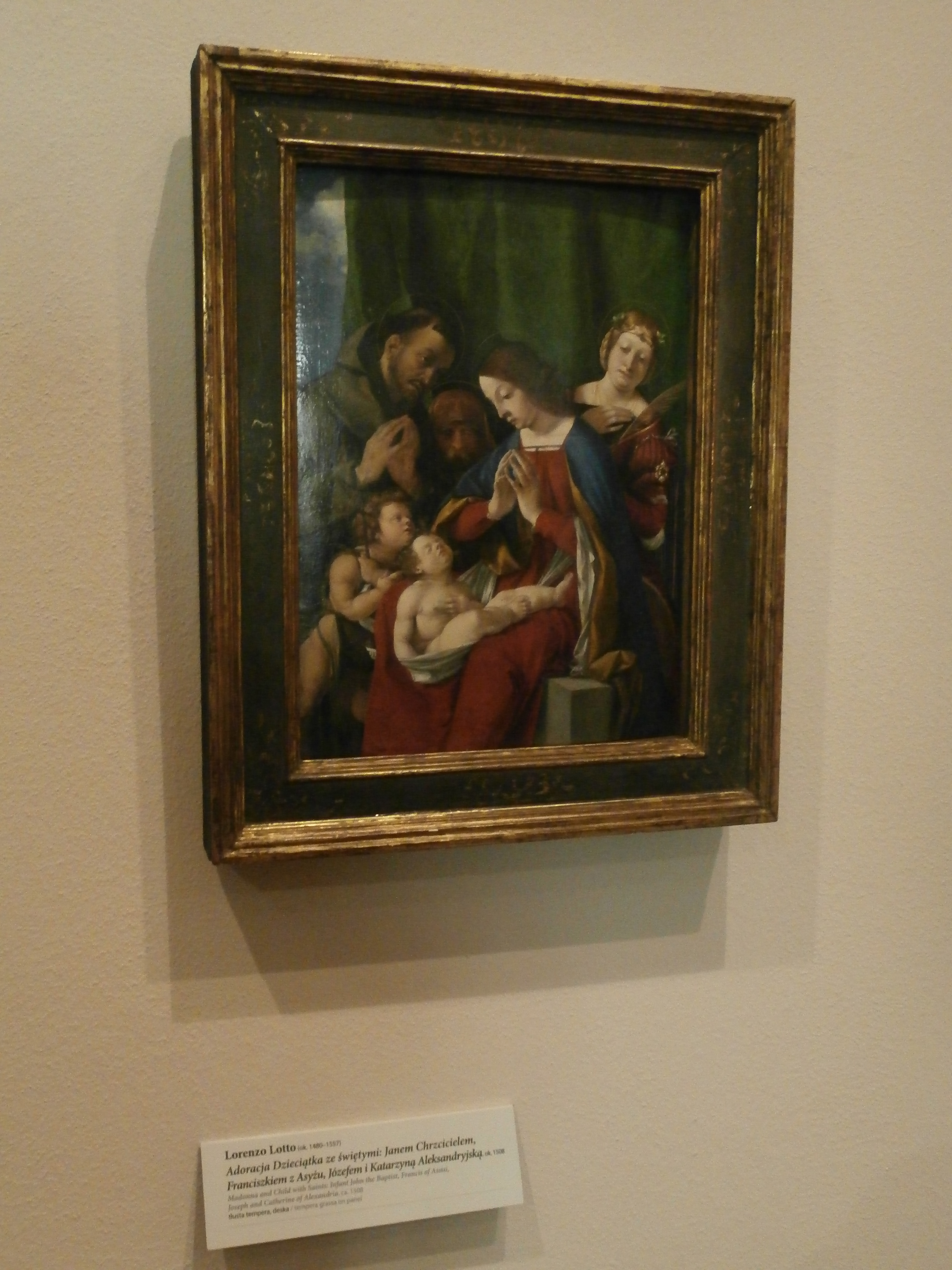 Obraz "Adoracja Dzieciątka" autorstwa Lorenzo Lotto na wystawie w Krakowskim Europeum. (Artykuł w Wikipedii)